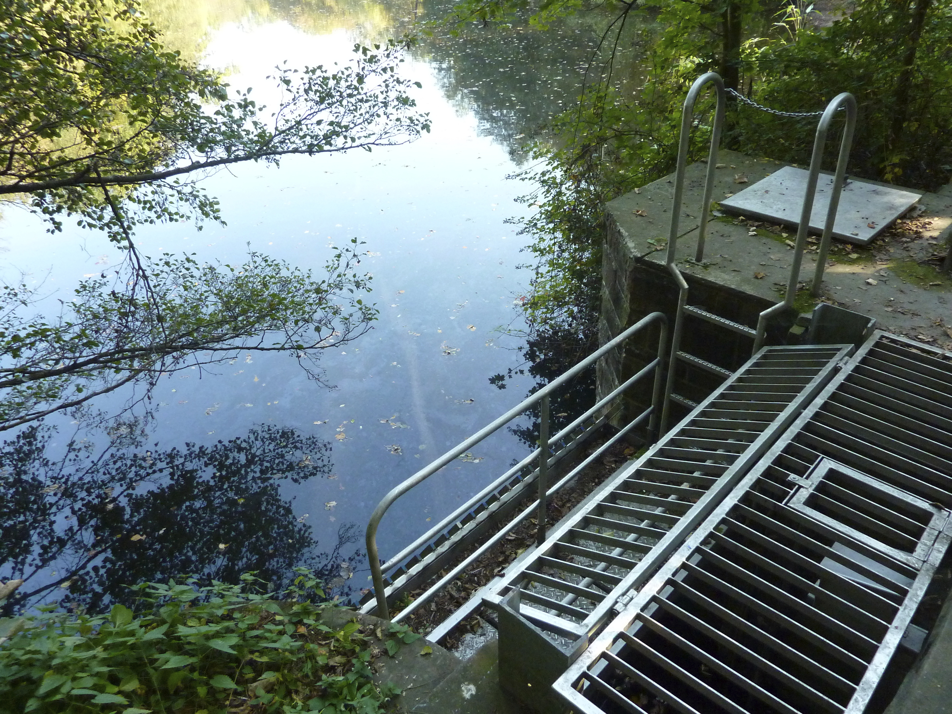 Frankfurt am Main, Stadtwald: Der Jacobiweiher auf dem Gebiet des Stadtteils Sachsenhausen wurde 1932 als Hochwasser-Rückhaltebecken angelegt. Mit einer Wasserfläche von sechs Hektar ist er Frankfurts größtes Stillgewässer. Das Foto zeigt das Wehr des Königsbachs aus dem Teich an dessen nordwestlichem Ende, der Teich wurde durch das Aufstauen des Baches geschaffen, und der Königsbach fließt durch diesen von Südosten einmündend hindurch